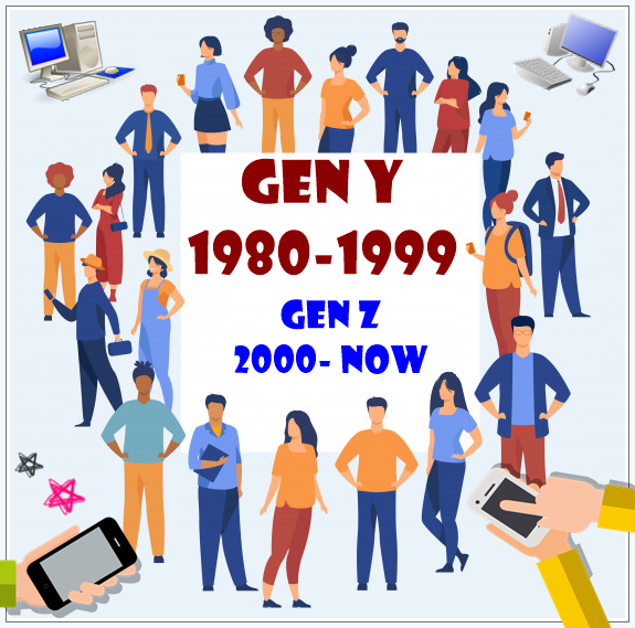 Das Bild mit den Daten der Generationen Y und Z.